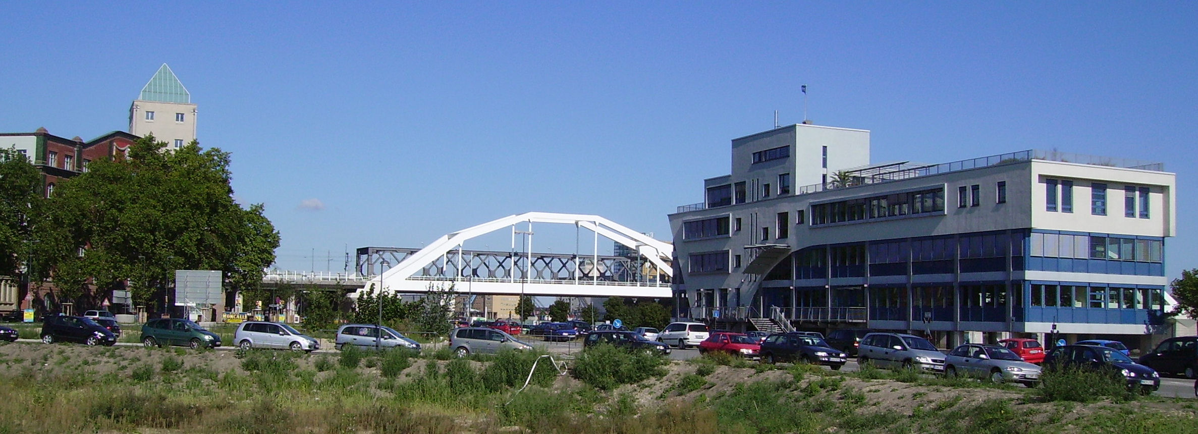 Walzmühle and East Asia Institute, Ludwigshafen, Rheinland-Pfalz (Germany)